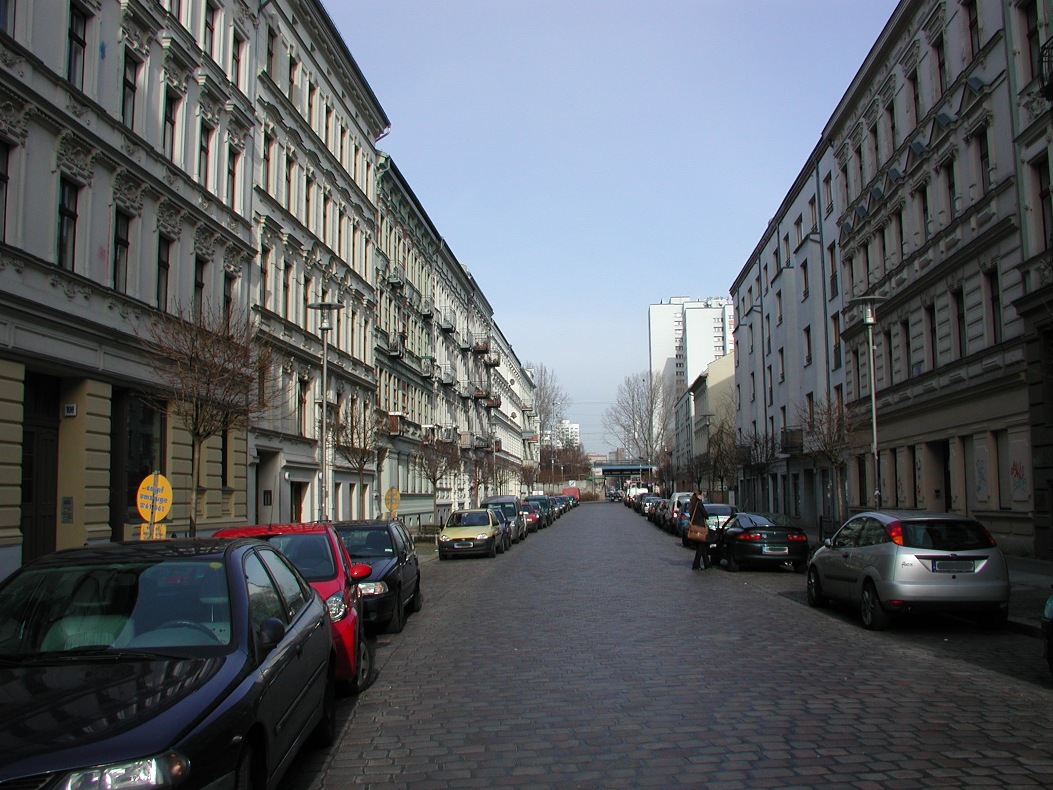 Blick in die Pfarrstraße Richtung Norden